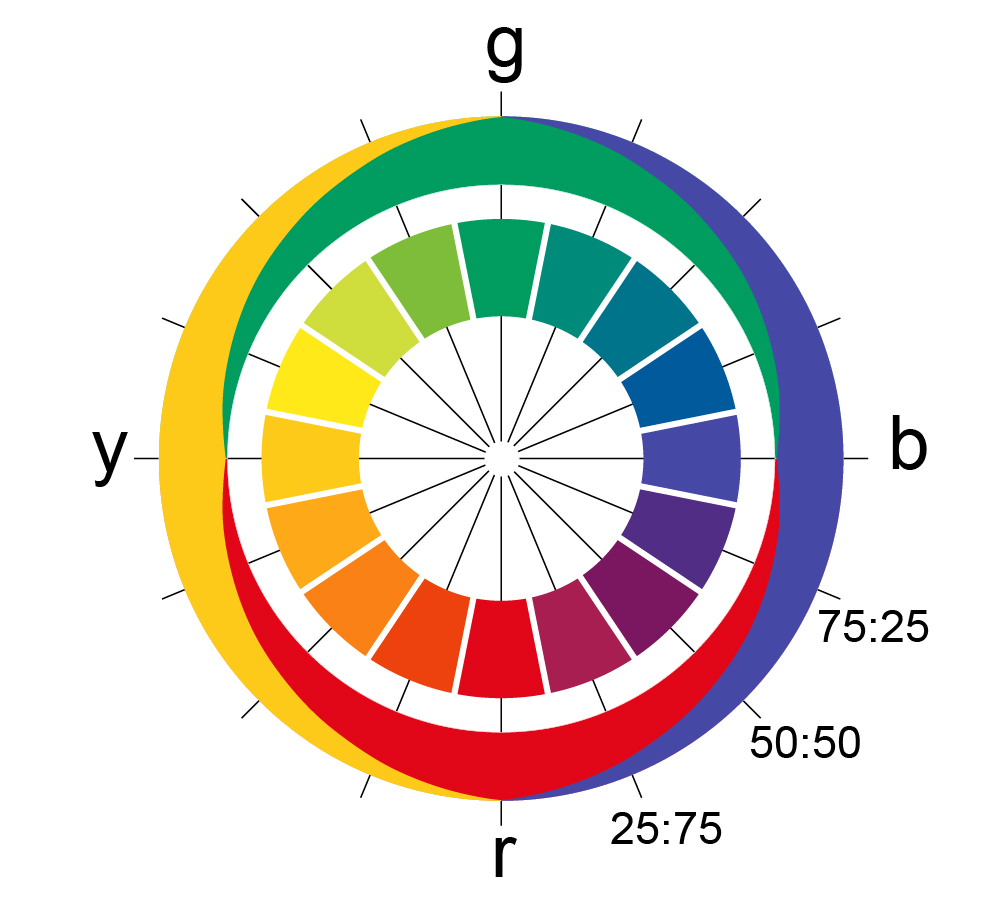 Farbkreis nach Ewald Hering. Die Werte in Prozent geben die in einem Farbfeld gleichzeitig empfundenen Anteile der Grundfarben Rot, Gelb, Grün und Blau wieder. Gelb und Blau, beispielsweise, können nach diesem Modell nicht gleichzeitig in einer Farbe empfunden werden. Hexadecimal: e10718 = r ed420e fa8116 fea918 fdca19 = y ffe919 cfde3d 7ebd3a 019d60 = g 008a7a 00748b 015a9c 4548a5 = b 512d85 7b1760 a81e51 e10718 = r